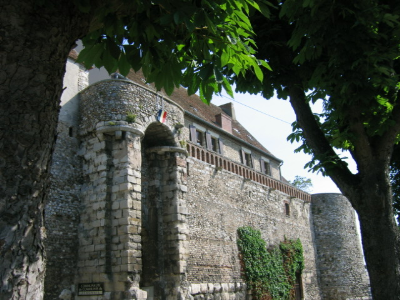 Remparts de la poterne à Sens (Yonne).